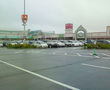 イオンモール下田（撮影当時：イオン下田ショッピングセンター）